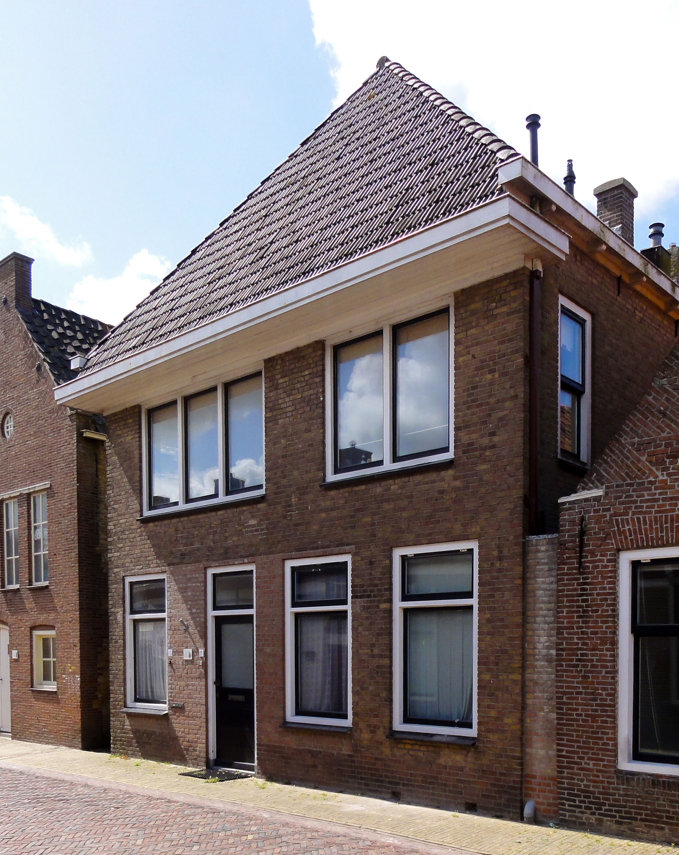 Nije Buorren 11 in Ferwerd